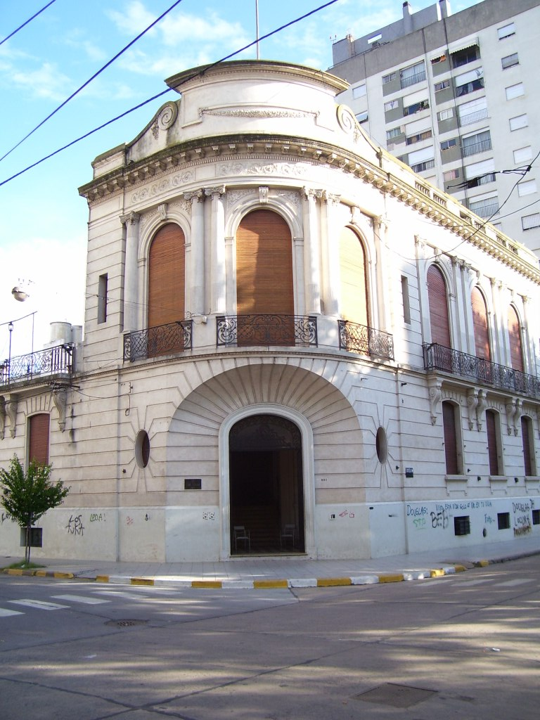 El Club Social, Pergamino, Argentina.